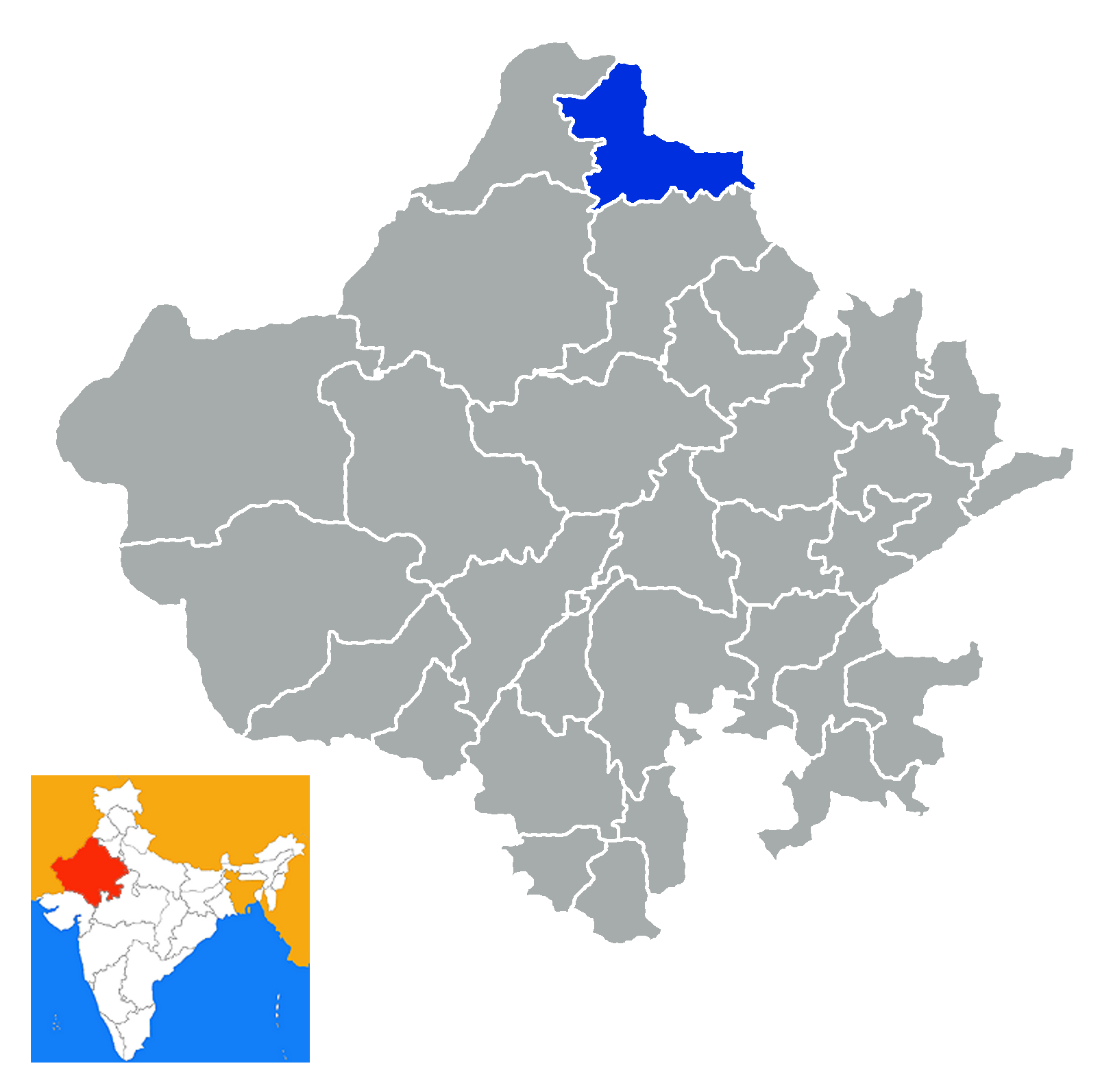 Distrito de Hanumagar Rajastan India